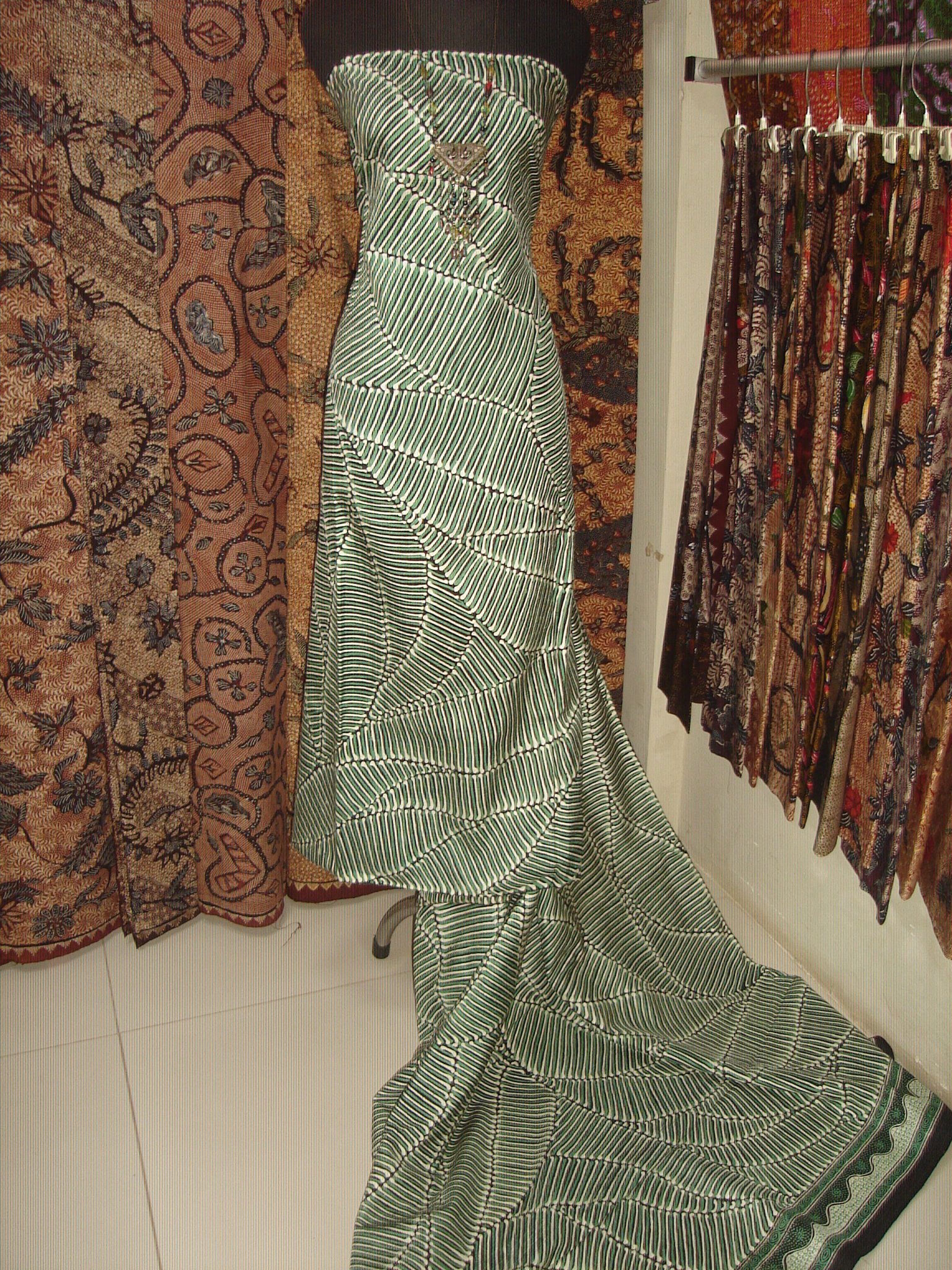 Motif batik Tulis madura